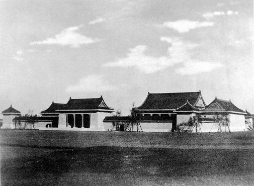 State foundation martyrs shrine of Manchukuo（满洲国建国忠灵庙）